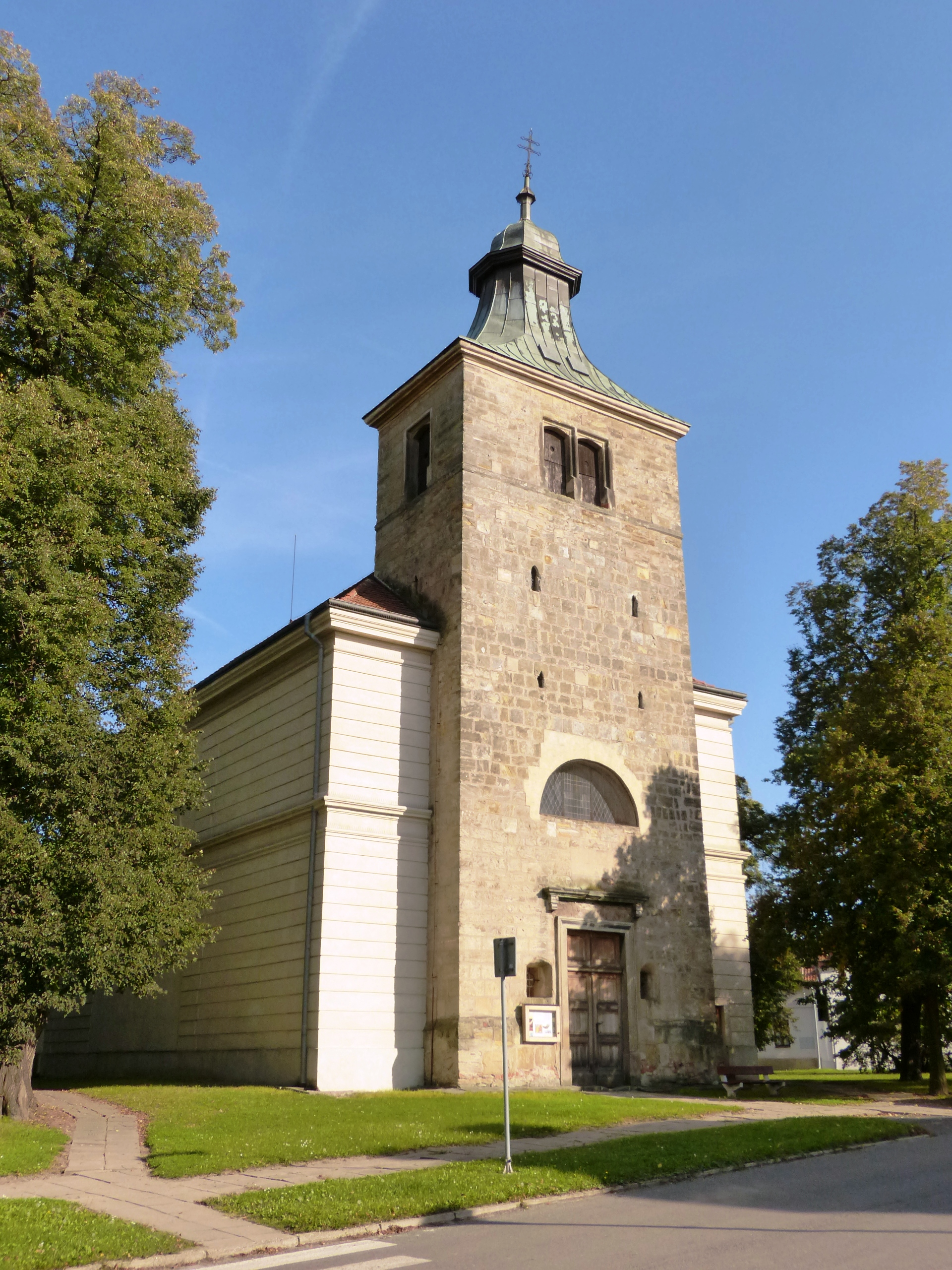 Kostel sv. Jakuba Většího, náves, Kounice, Kounice.